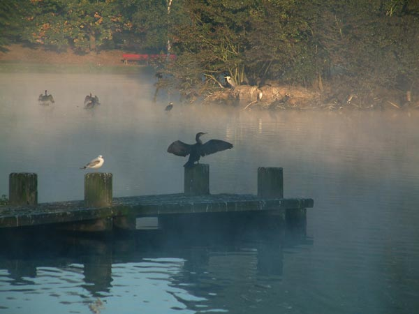 Ümminger See am Morgen 2003